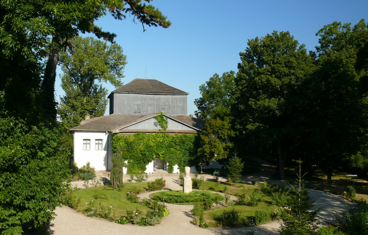 Conac 01